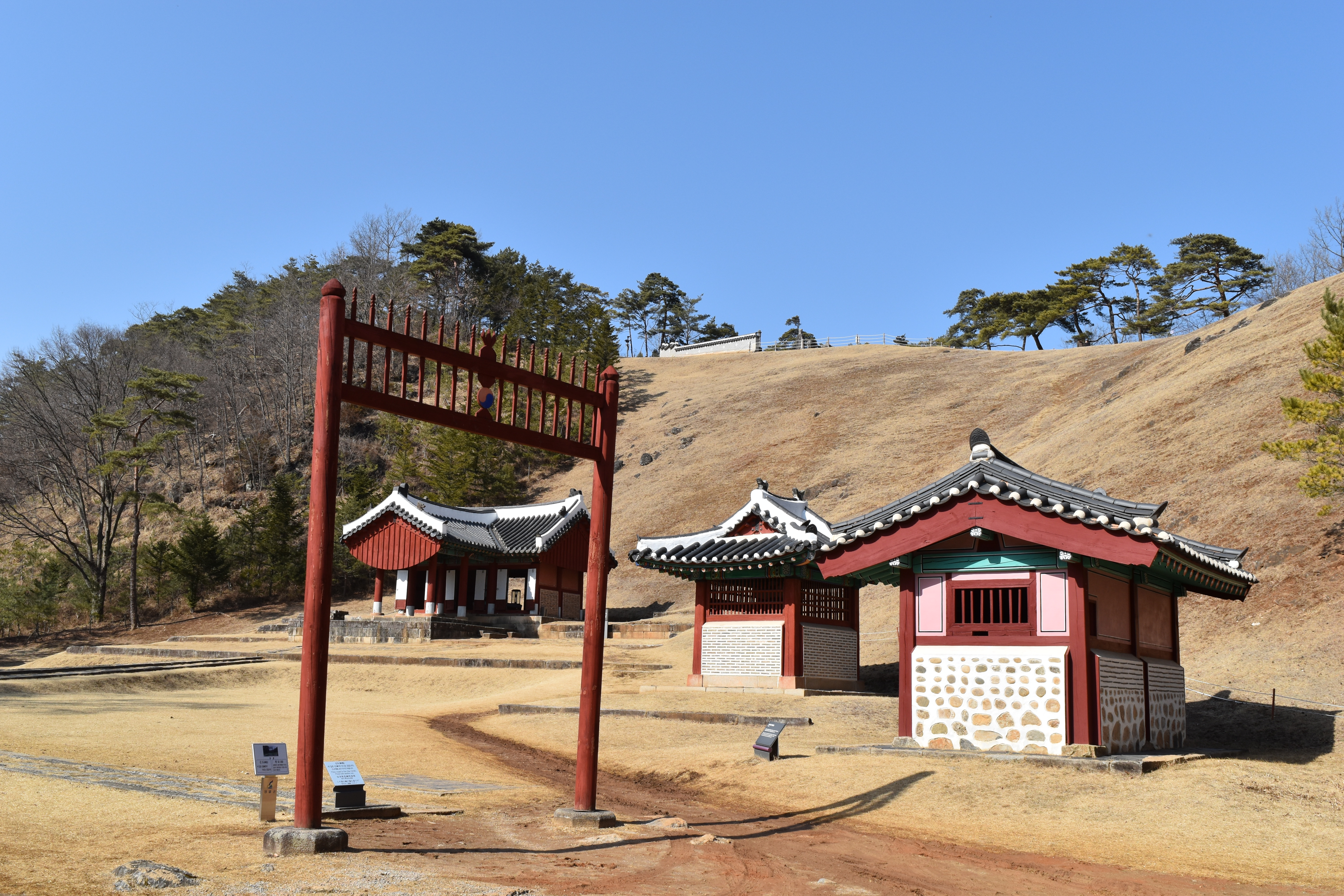 영월 장릉 일대의 전경